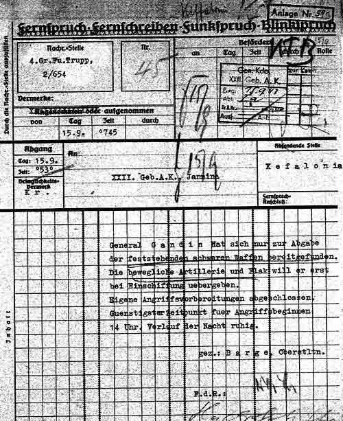 Kess[...] (o Keff) Funkspruch Hoch stelle 4 Gr.Fu.Trupp 2/654 Nr. 45 Befordert Anlage Nr. 5? durch: KTB (Kriegstagebuch?) Angenommen oder aufgenommen: Tag: 15 9 Zeit: 07:45 Abgang: Tag: 15 9 Zeit: 05:30 An: XXII Geb.A.K. Jan? (Gebirgsdivision ArmeeKorps?) Absendende Stelle: Kefalonia Inhalt: General Gandin hat sich nur zur Abgabe der feststehenden schweren Waffen bereit gefunden. Die bewegliche Artillerie und Flak will er erst bei Einschiffung übergeben. Eigene Angriffsvorbereitungen abgeschlossen. Guenstigster Zeitpunkt für Angriffsbeginn 14 Uhr. Verlauf der Nacht ruhig. gez.: Barge Oberstltn. F.d.R